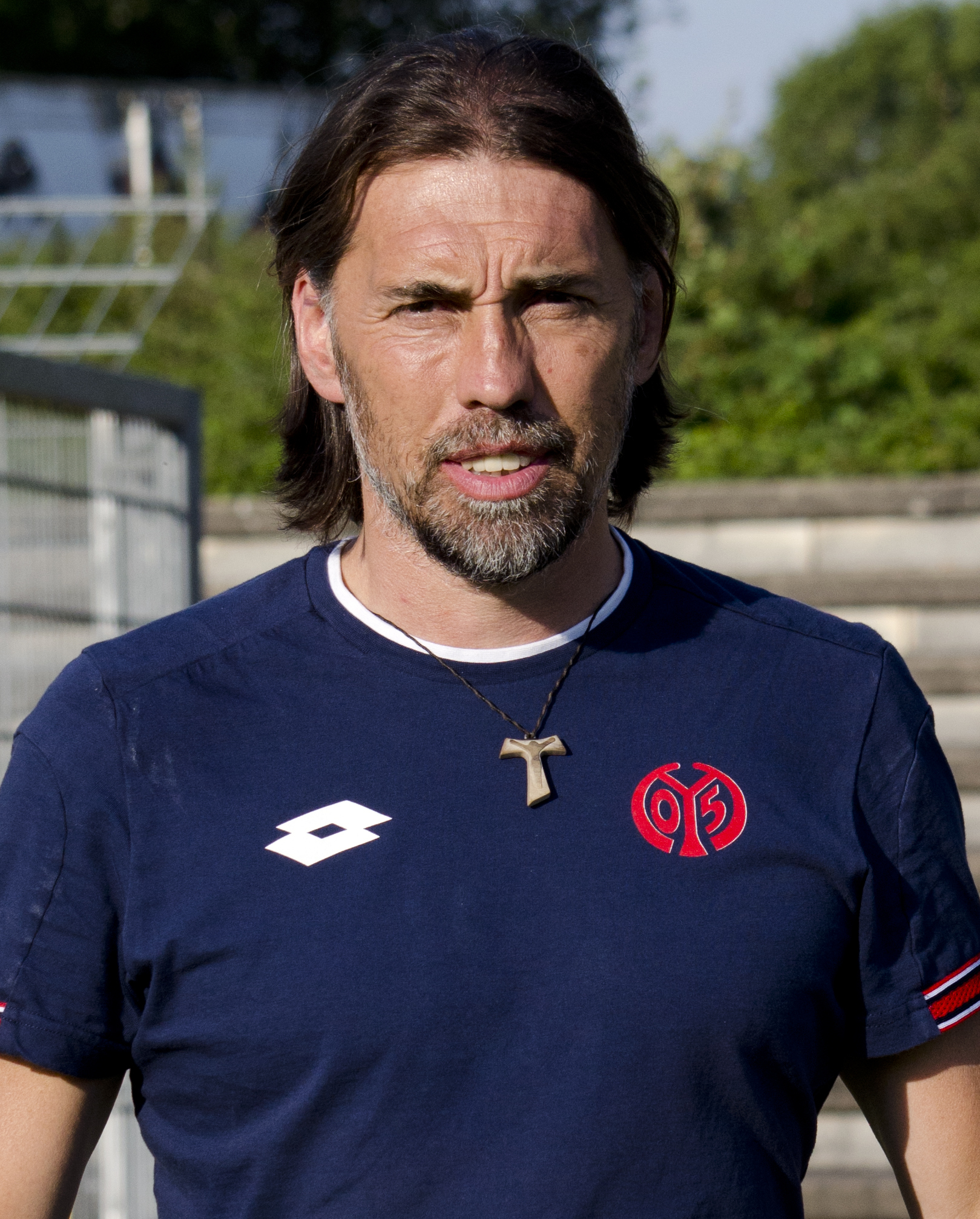 Martin Schmidt, Schweizer Fussballtrainer